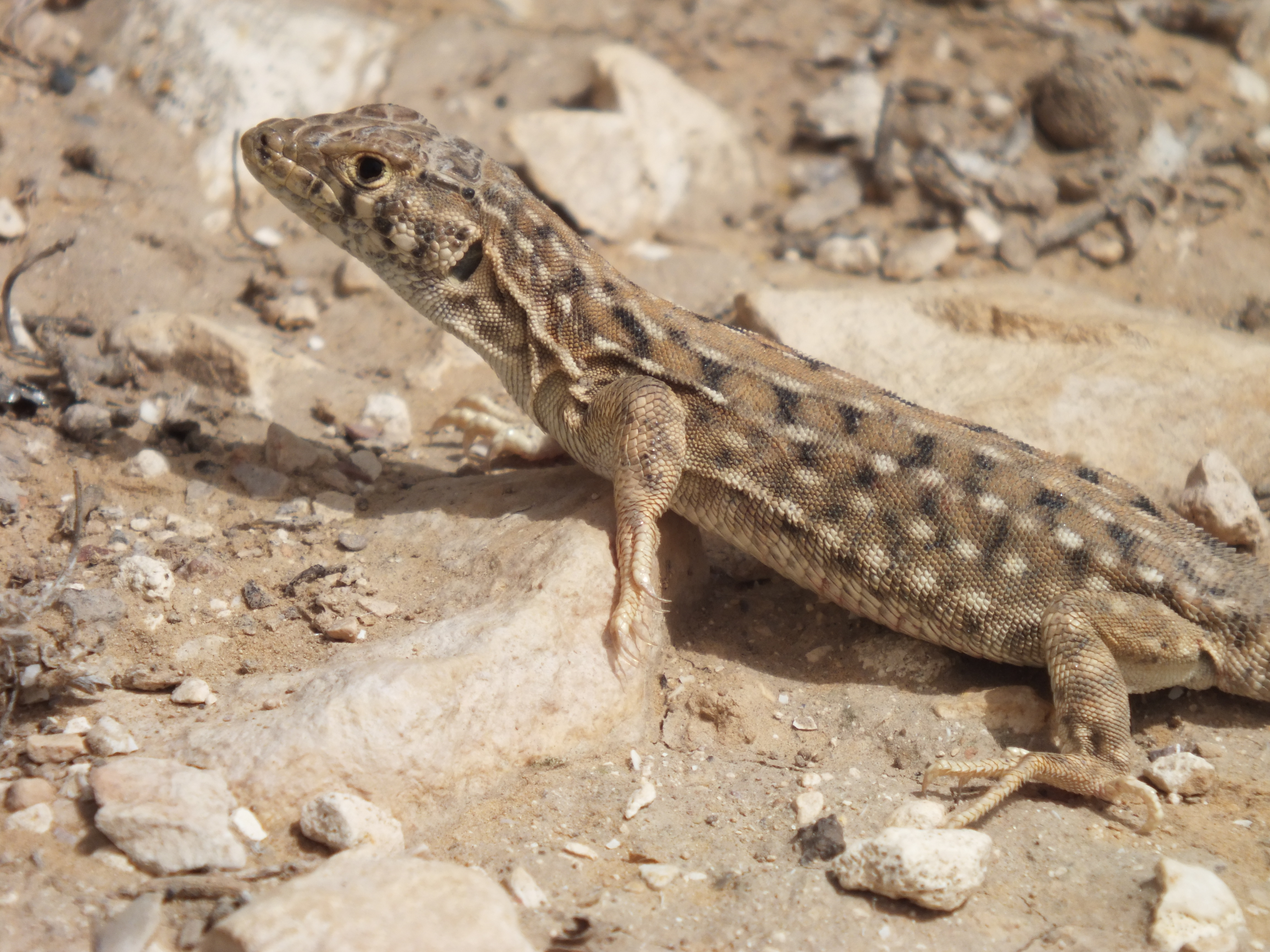 שנונית באר-שבע היא מין של לטאה אנדמית לישראל שחיה במישורי וגבעות הלס של הנגב שנונית באר שבע, נקבה, צולמה בגן לאומי תל ערד